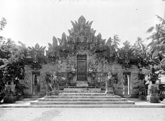 Negatief. Voorzijde van een poort in de Pura Beji te Sangsit